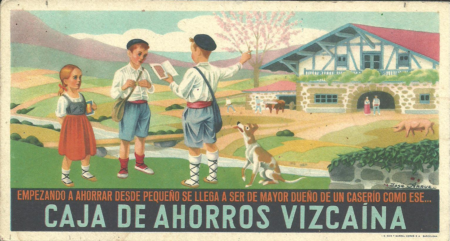 Secante publicidad Caja Ahorros Vizcaina 105 x 195 mm